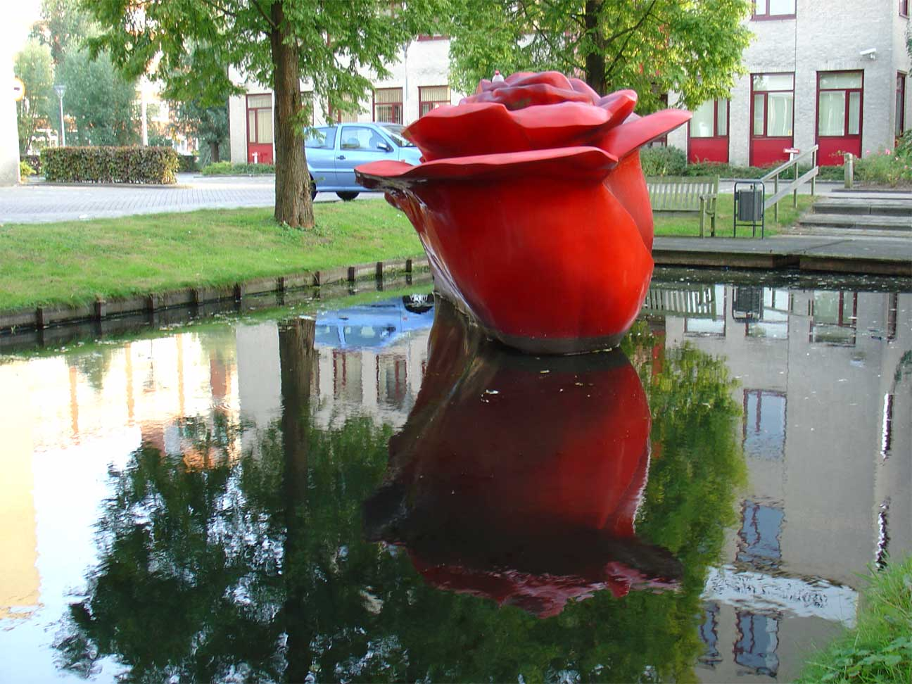 De Roos (polyester, 1997) door Miriam Piña Bleulandweg Gouda